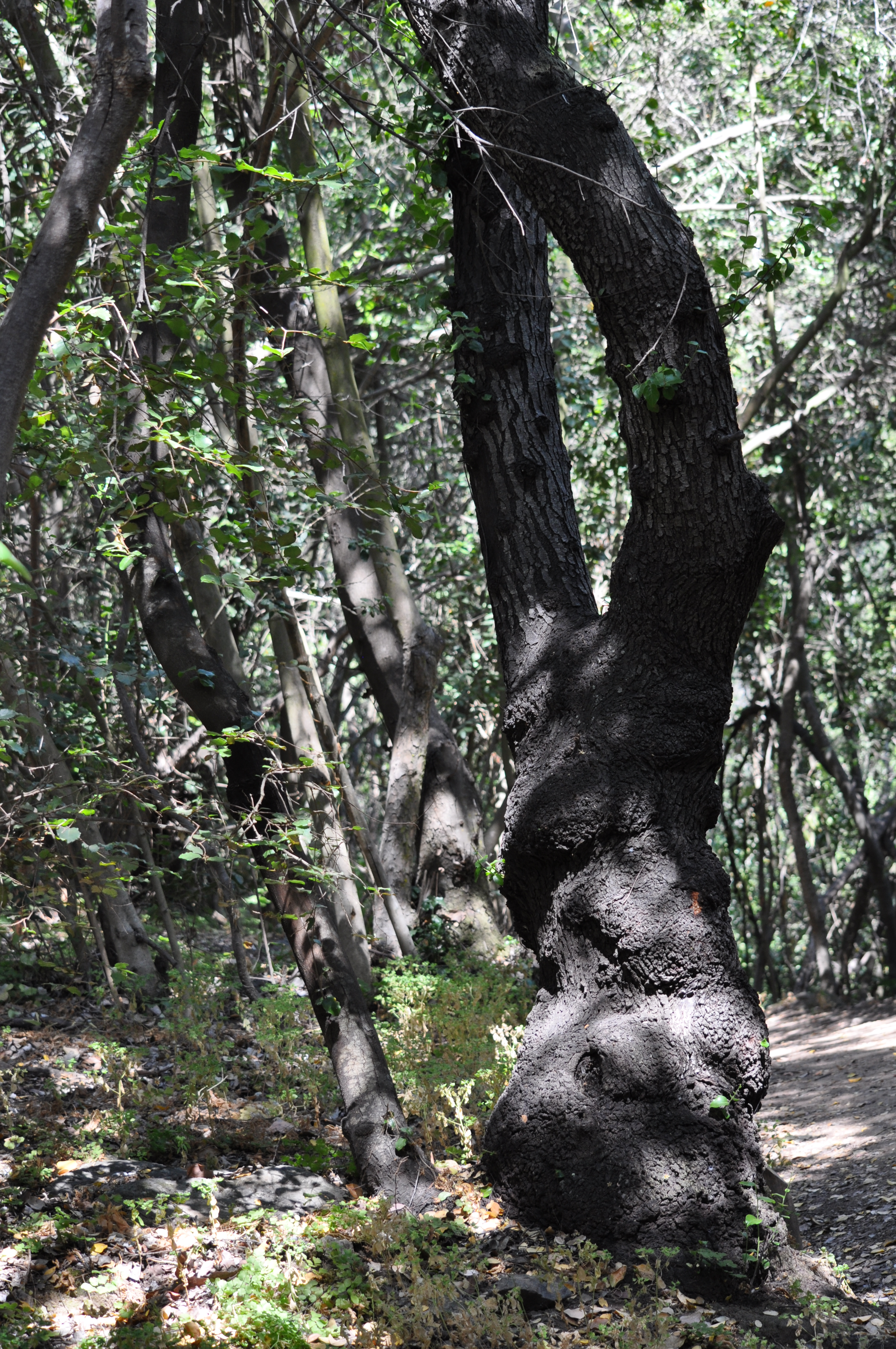 Quillaja_saponaria (quillay) en el parque nacional La Campana, Región de Valparaíso, Chile. Circuito La Canasta.